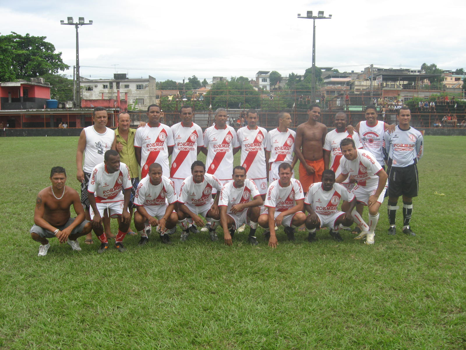 Equipe Sub-35 do Olímpico Esporte Clube, de Venda Velha, São João de Meriti.